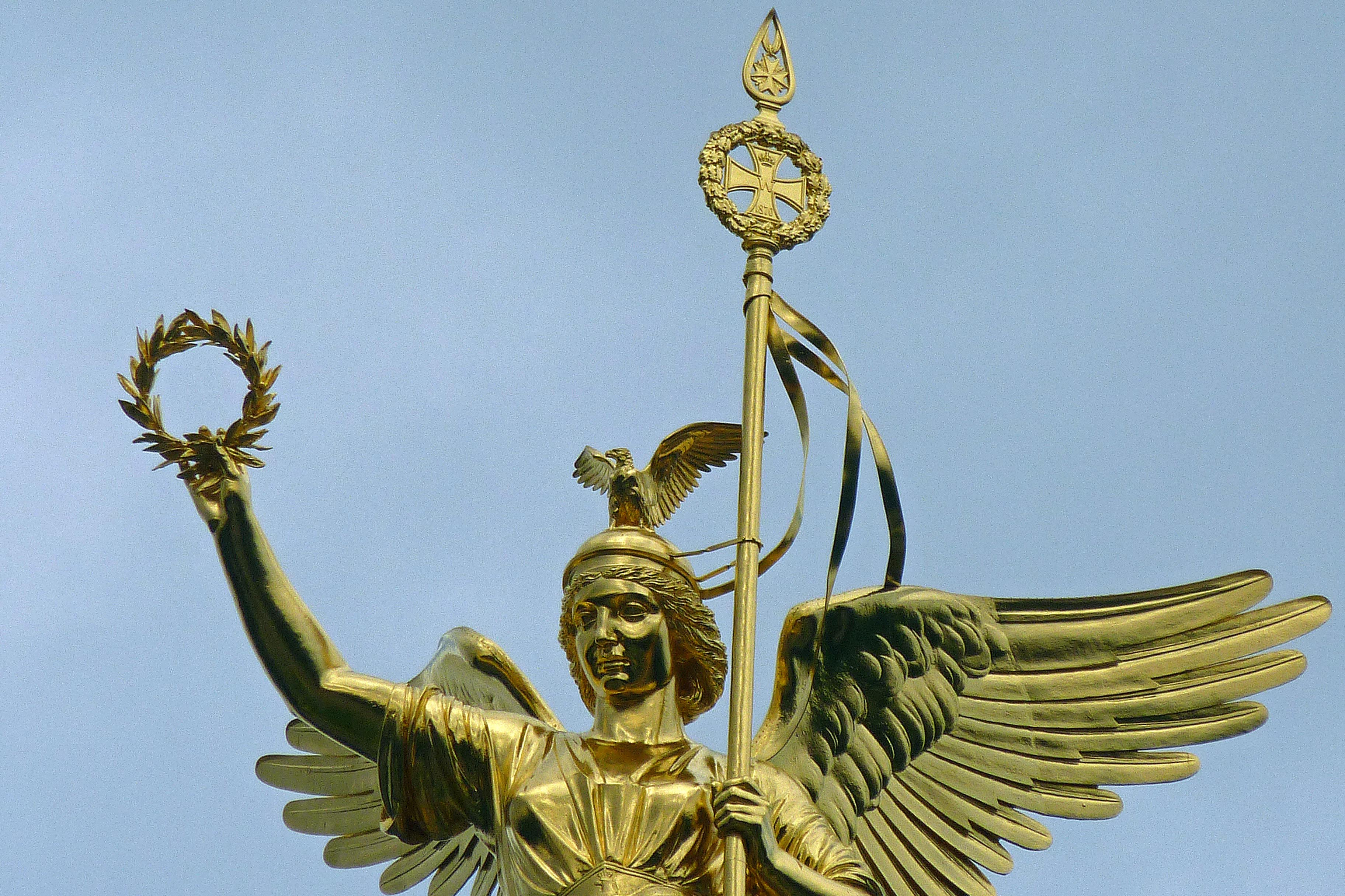 Teilansicht der Siegesgöttin Viktoria auf der Berliner Siegessäule